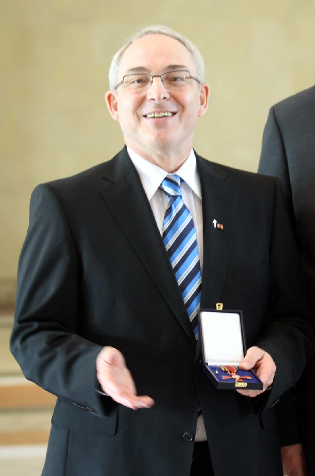 Florian Schuller, deutscher katholischer Geistlicher sowie Direktor der Katholischen Akademie in Bayern. Kurz nach der Übergabe des Verdienstkreuzes am Bande der Bundesrepublik Deutschland in der Bayerischen Staatskanzlei (Kuppelsaal) am 4.05.2012. Der Ausschnitt aus der Quelle wird hiermit frei unter CC BY-SA 3.0 de lizenziert.